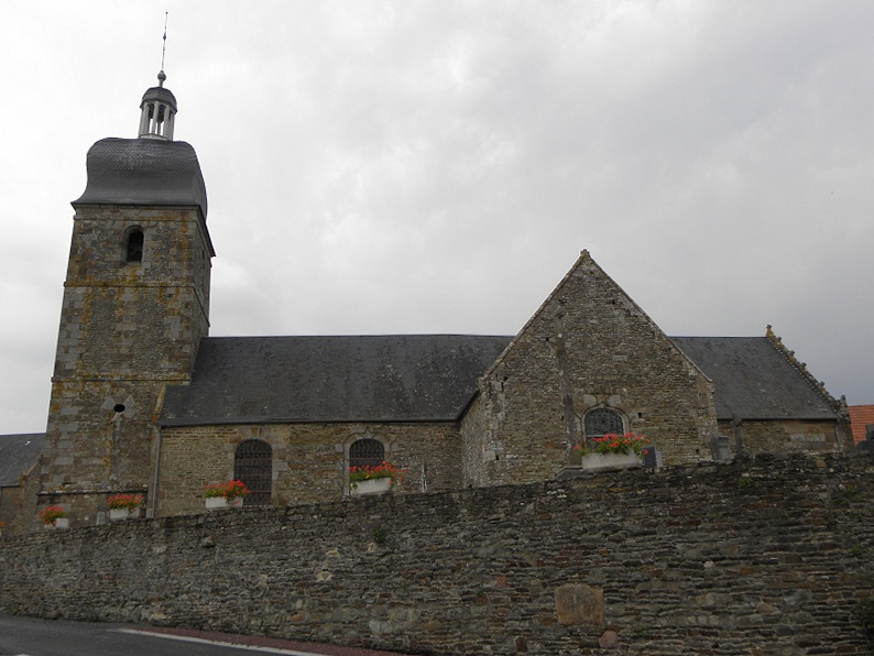 Église Saint-Martin à Servon (50).